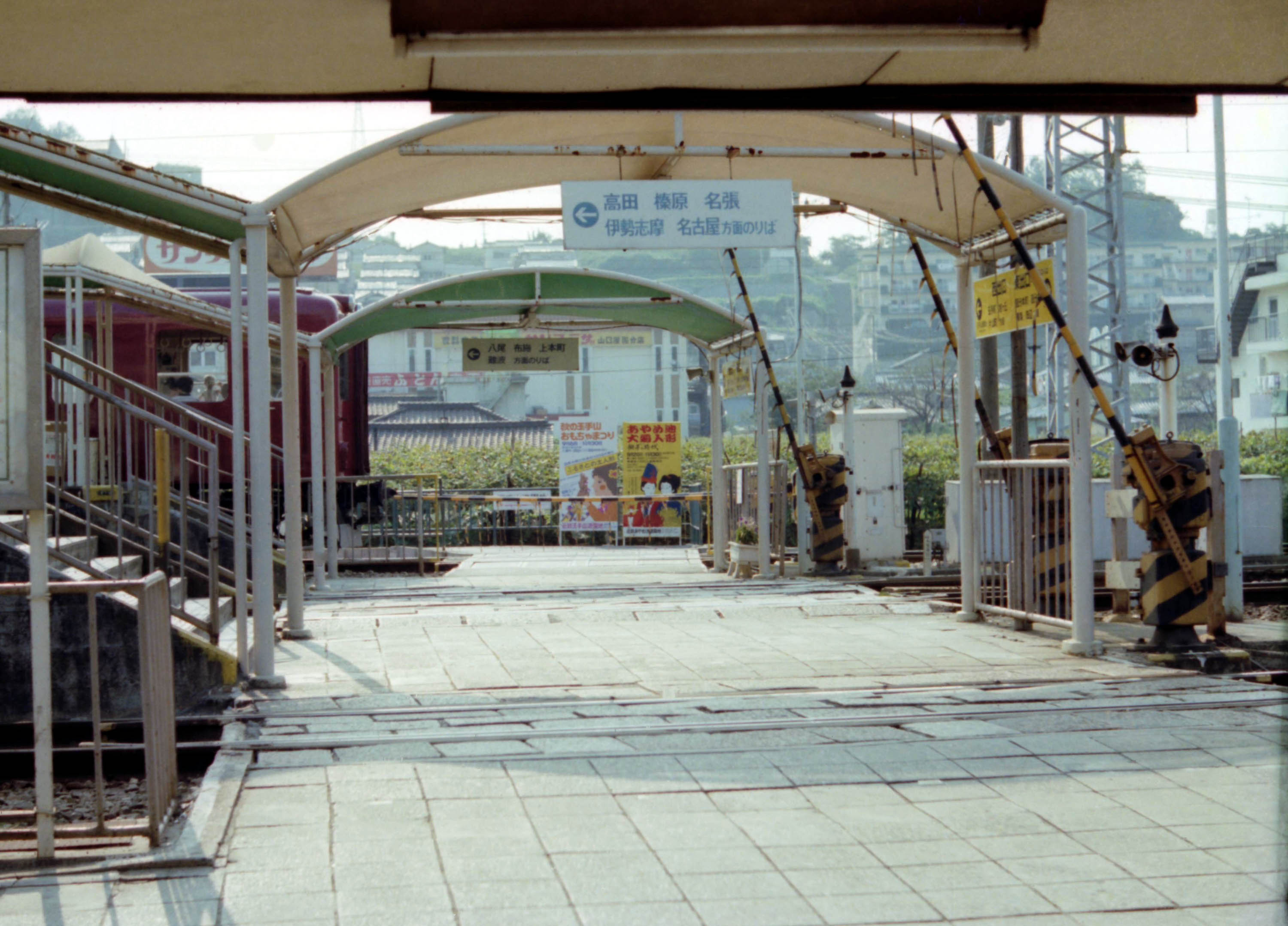 近鉄 河内国分駅 構内通路 Ｓ５５年８月頃